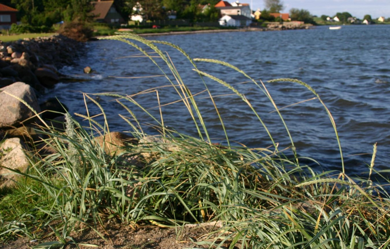 Leymus arenarius: Habit.